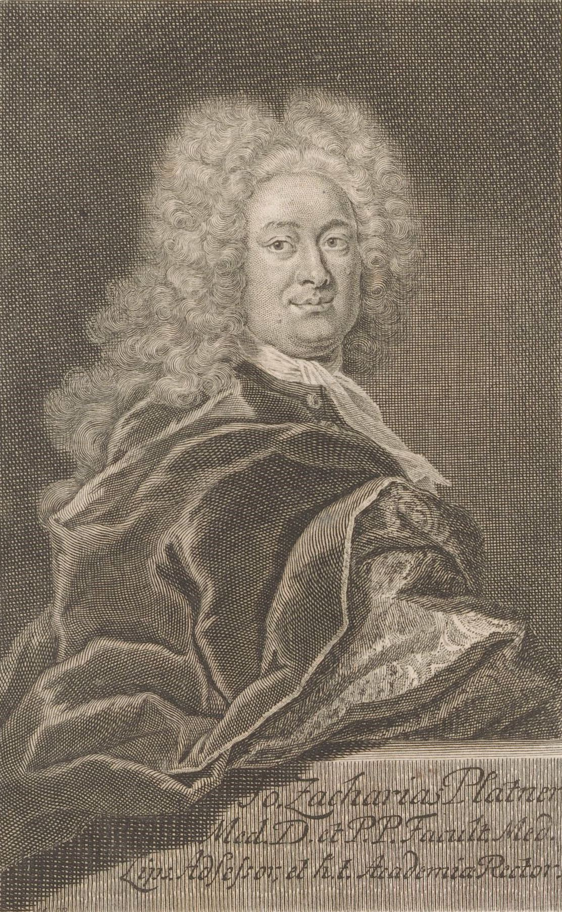 IdentificatieTitel(s): Portret van Johann Zacharias PlatnerObjecttype: prent Objectnummer: RP-P-1914-1671Catalogusreferentie: HAB A 16606VervaardigingVervaardiger: prentmaker: Martin Bernigeroth (vermeld op object)Plaats vervaardiging: LeipzigDatering: 1728Fysieke kenmerken: gravureMateriaal: papier Techniek: graveren (drukprocedé)Afmetingen: plaatrand: h 151 mm × b 98 mmToelichtingPrent ook gebruikt in: Deutsche Acta Eruditorum (...). Leipzig: Johann Gottlieb Gleditsch, 1728.OnderwerpWat: historical personsWie: Johann Zacharias PlatnerVerwerving en rechtenVerwerving: aankoop 1905Copyright: Publiek domein